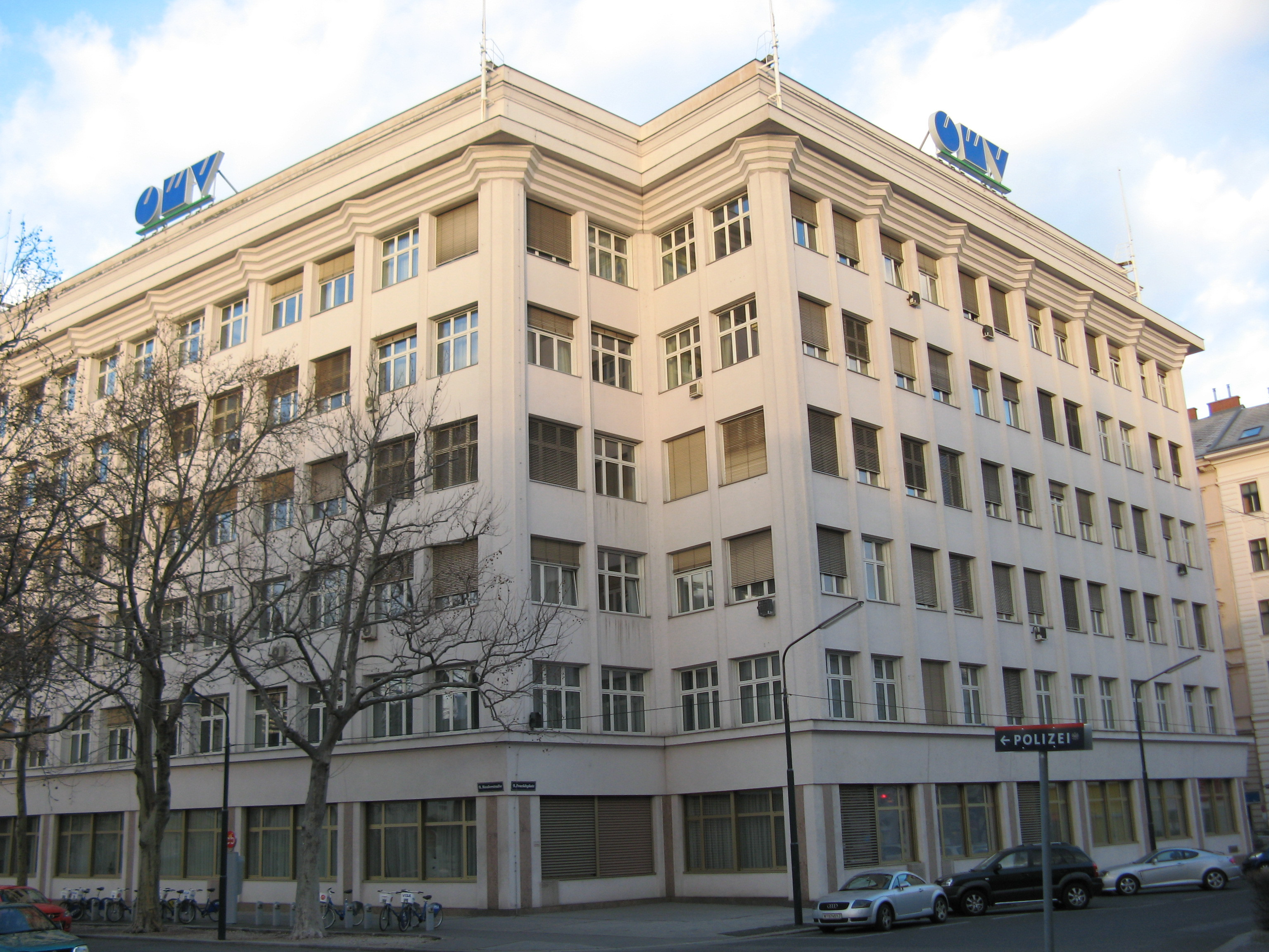 Gebäude der OMV (1928/29) von Ernst Epstein in Wien-Alsergrund